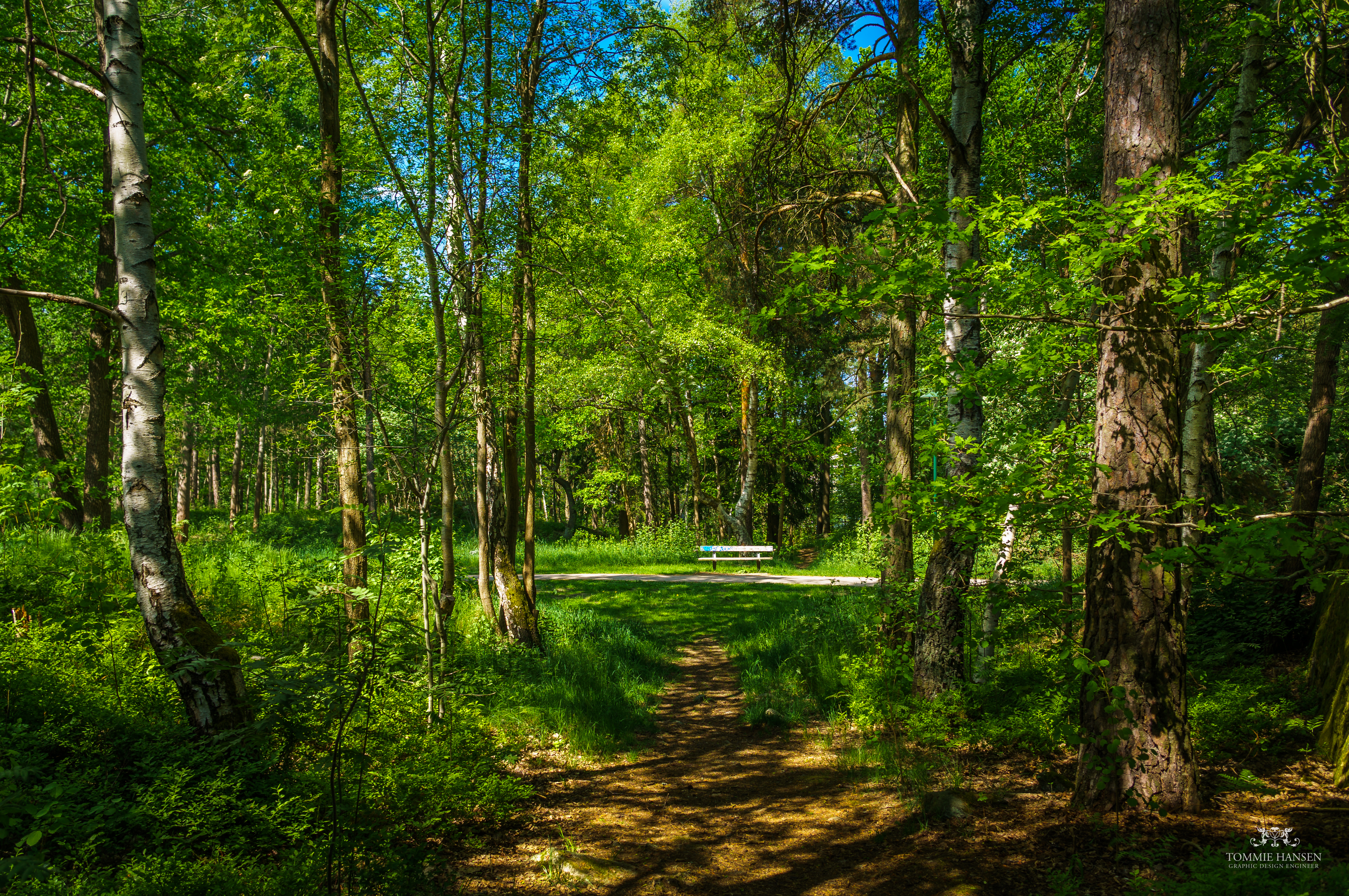 Forest and path at Zombieskogen, Västertorp (Stockholm)